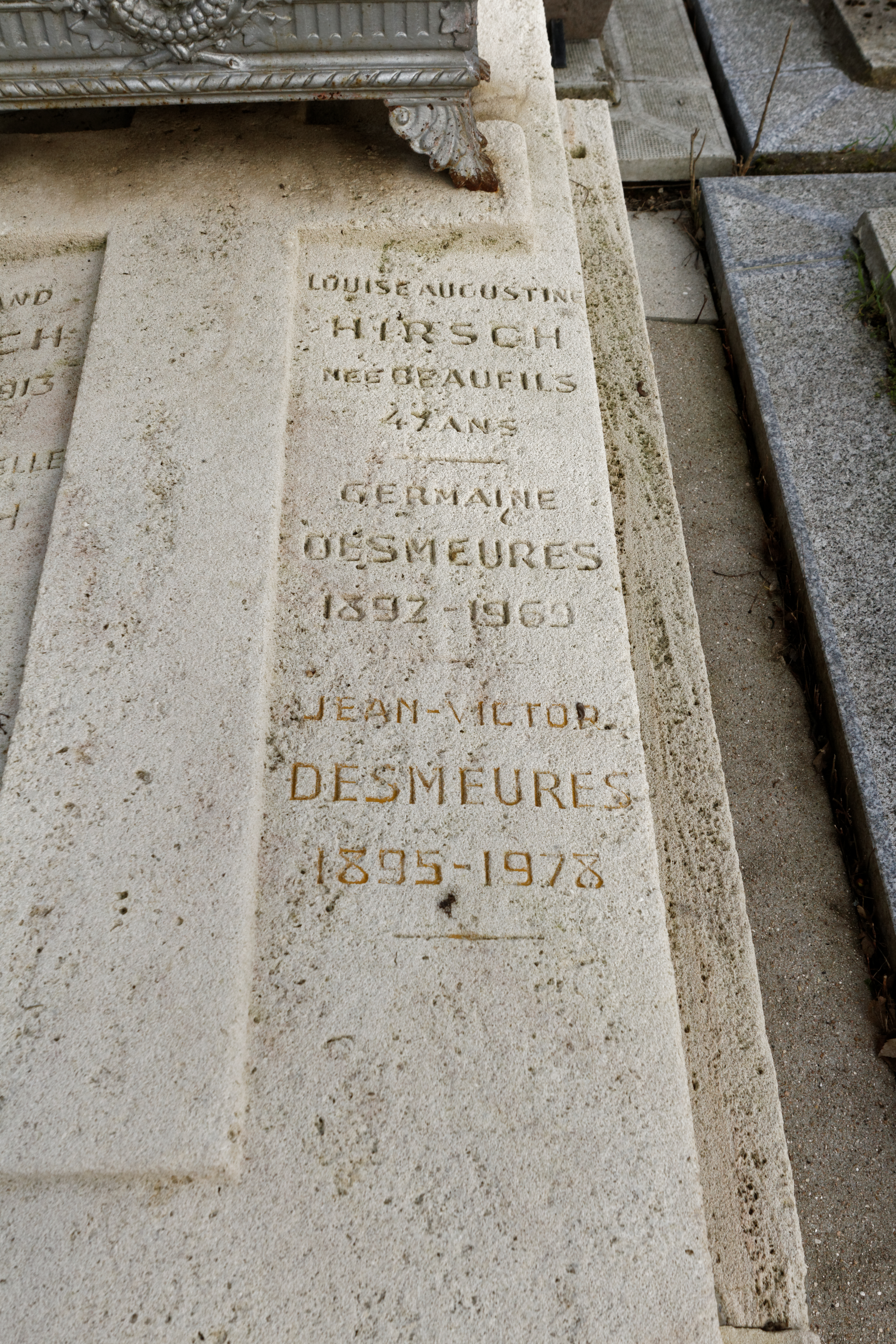 Sépulture de Georges Hirsch (1895-1974), directeur de théâtre français, membre de la Résistance et conseiller municipal de Paris ; Jean-François Hirsch (1925-1999), qui est à l'origine du premier service français de neurochirurgie pédiatrique à l'hôpital Necker-Enfants Malades à Paris en 1971.